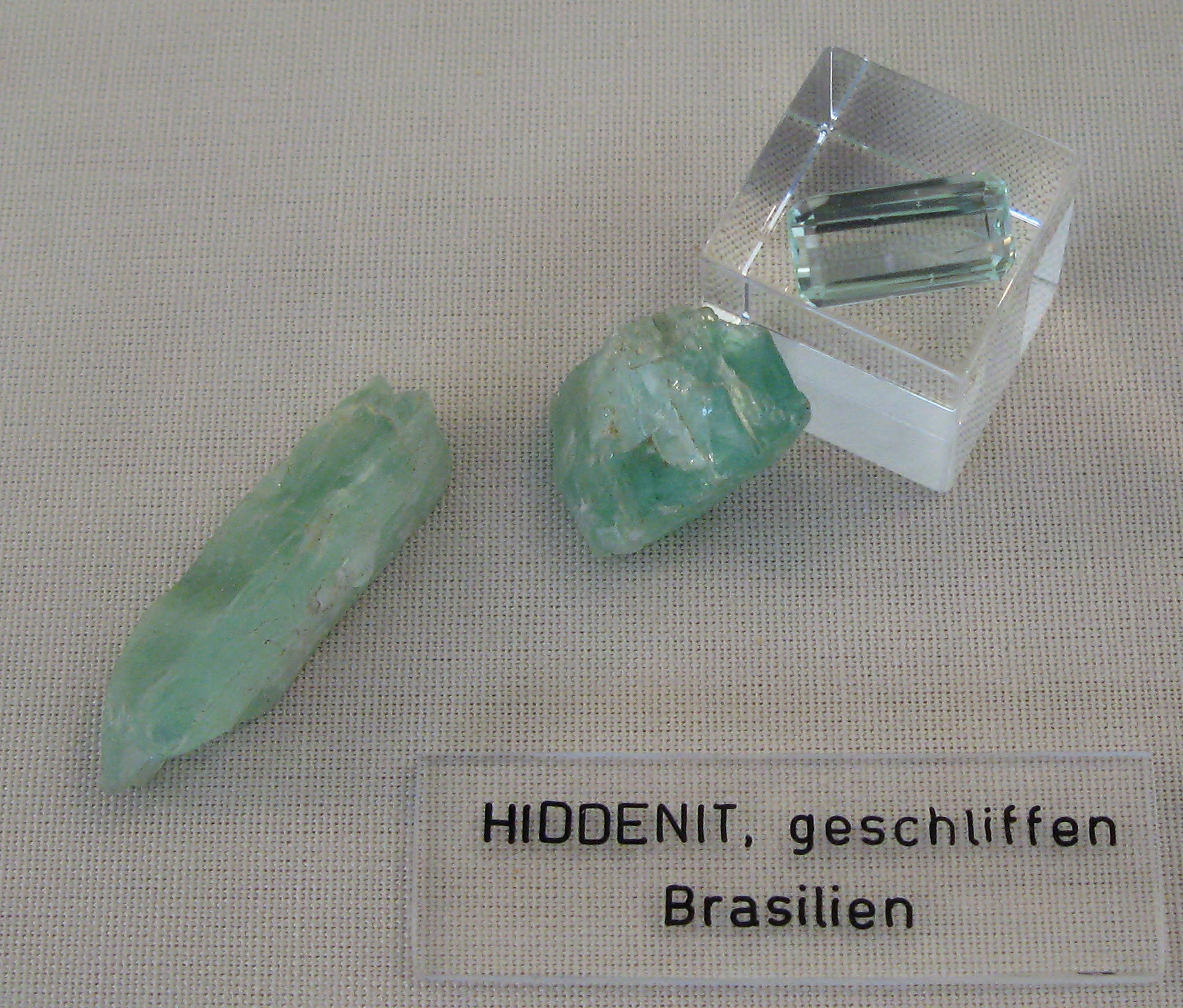 Hiddenit, zwei Rohsteine, ein Schmuckstein im Treppenschliff - Fundort: Brasilien - Ausgestellt im Mineralogischen Museum Bonn